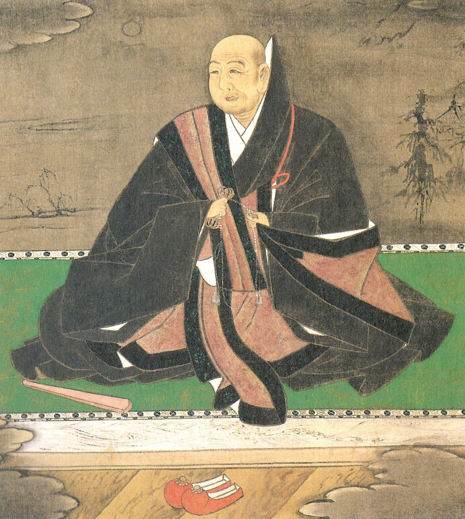 観音寺詮舜の肖像。